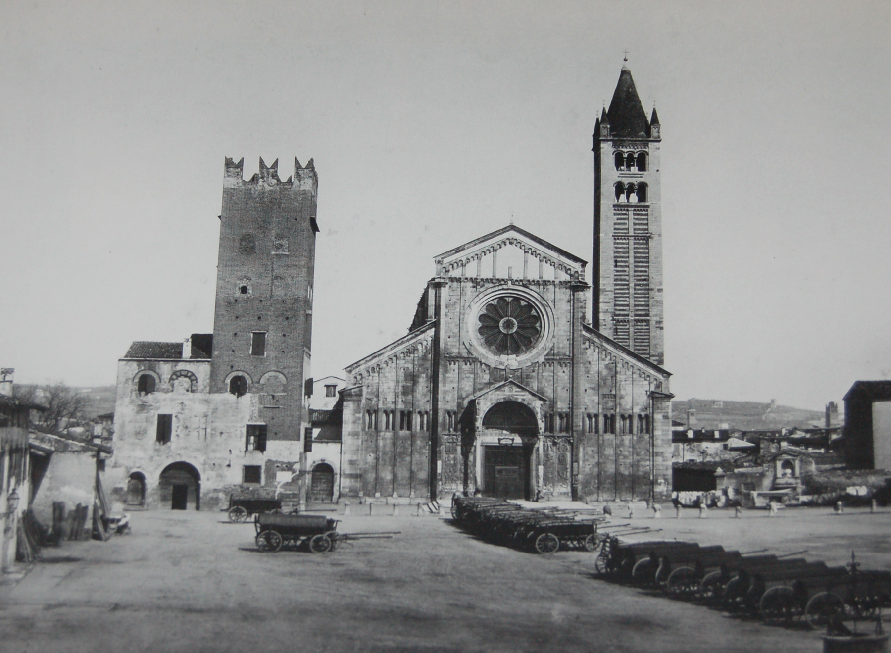 San Zeno a Verona. Foto di Moritz Lotze (1809-1890). Circa 1860. 2008.